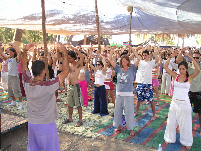 אימון he:פאלון דאפא בפסטיבל בראשית. נתרם על-ידי הצלמת תקווה לשימוש כל החפץ.